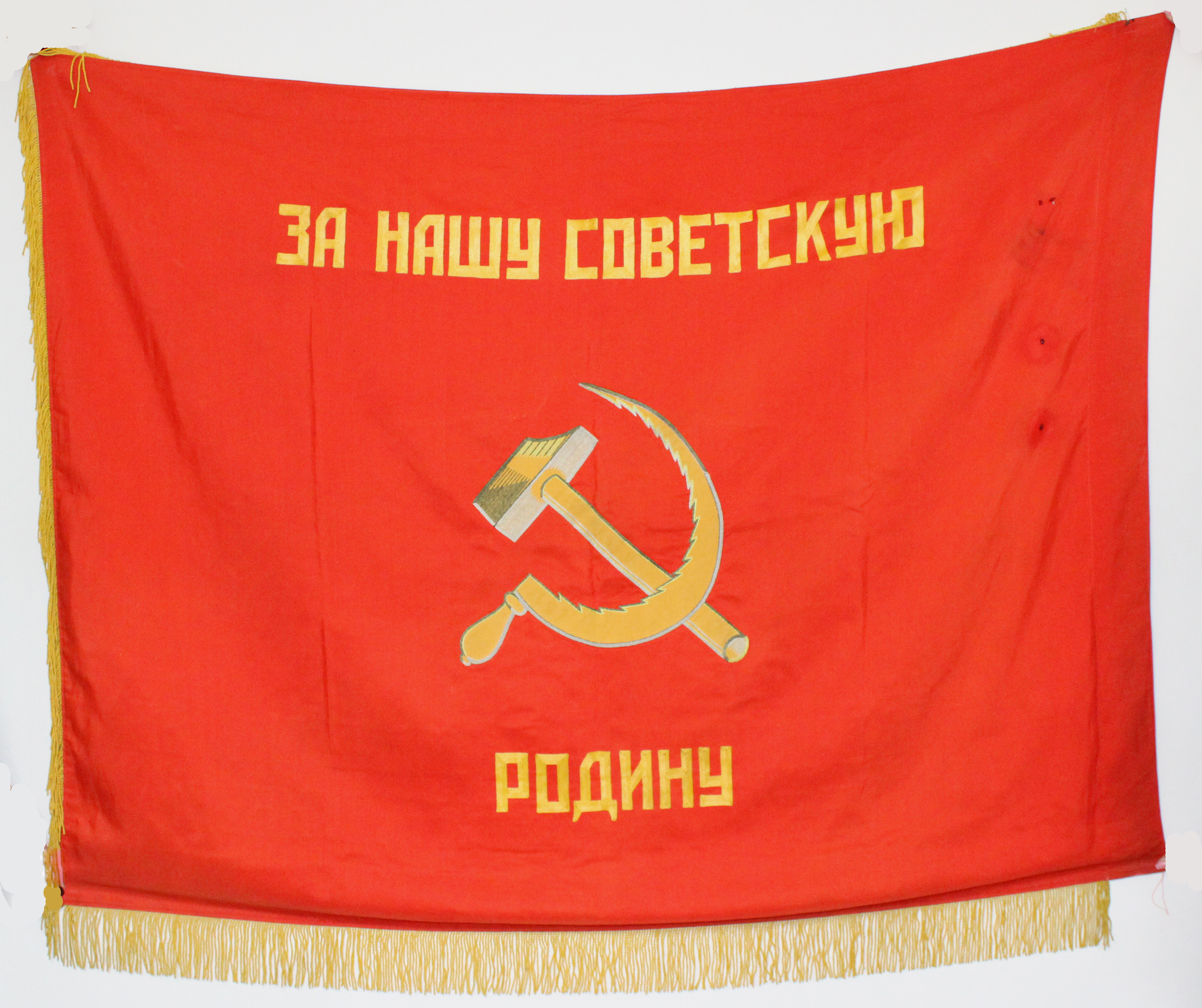 Знамя 172-го гвардейского мотострелкового полка. Реверс